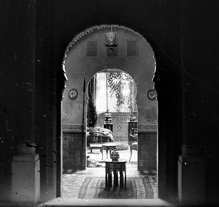 décor mauresque datant de 1865 de l'entée de l'atelier de sculpture de Charles Cordier 115, Boulevard Saint-Michel Paris 5ème